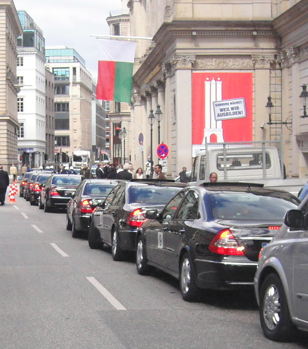 Besuch in der Handelskammer